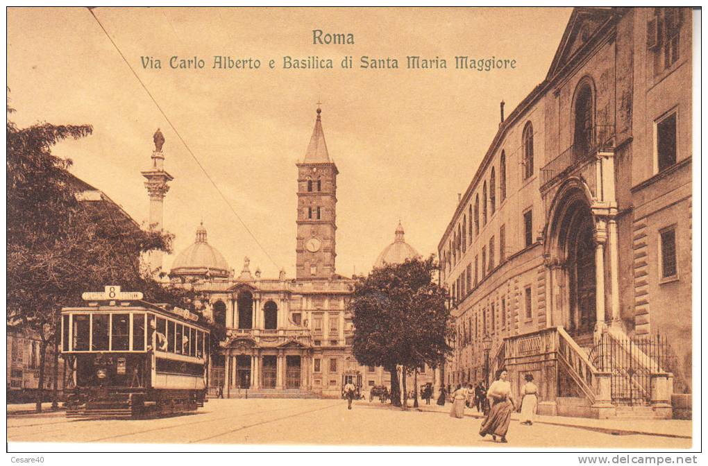 Roma Esquilino